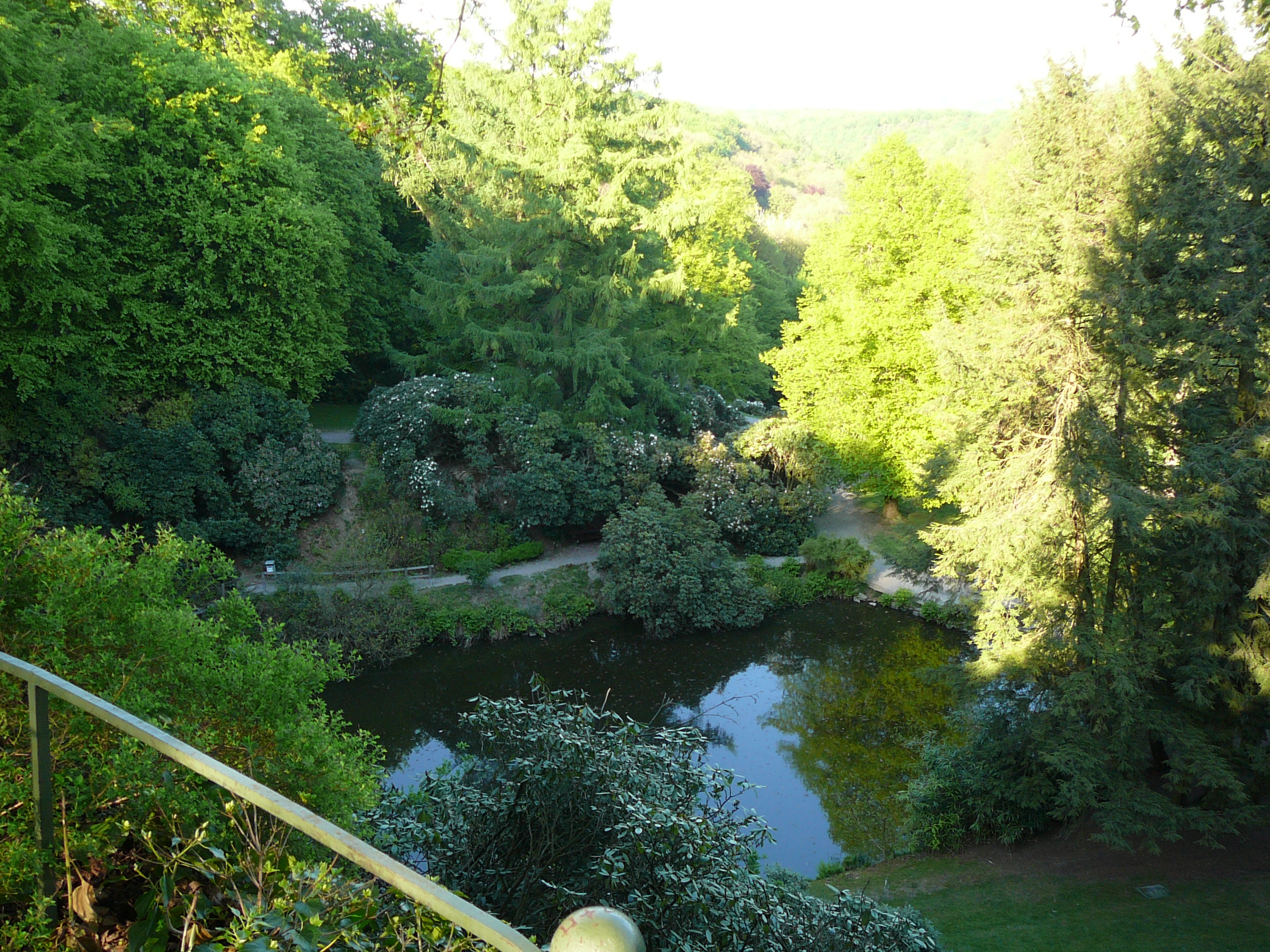 Adolf-Vorwerk-Straße, Wuppertal